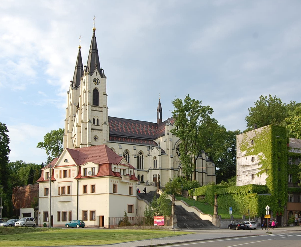 Kostel Narození Panny Marie v Orlové-Městě. Noc kostelů 2015. Pohled na farní budovu a kostel. Dole vlevo volné prostranství, kde stala orlovská Harenda.